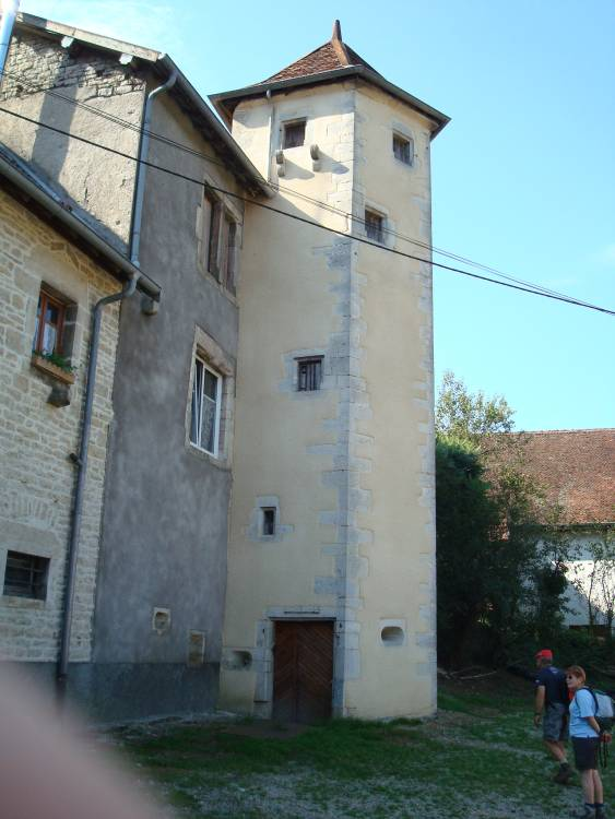 Photo de l'ancien chateau transformé en bâtiment agricole